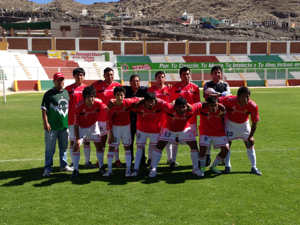 Sport Victoria 2012